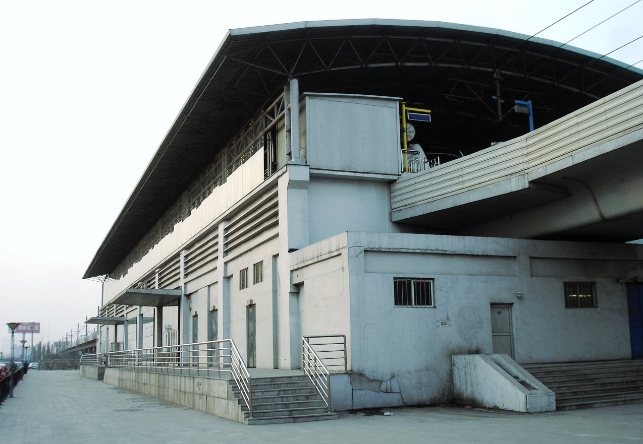 中文（中国大陆）: 军粮城站（地铁津滨线）